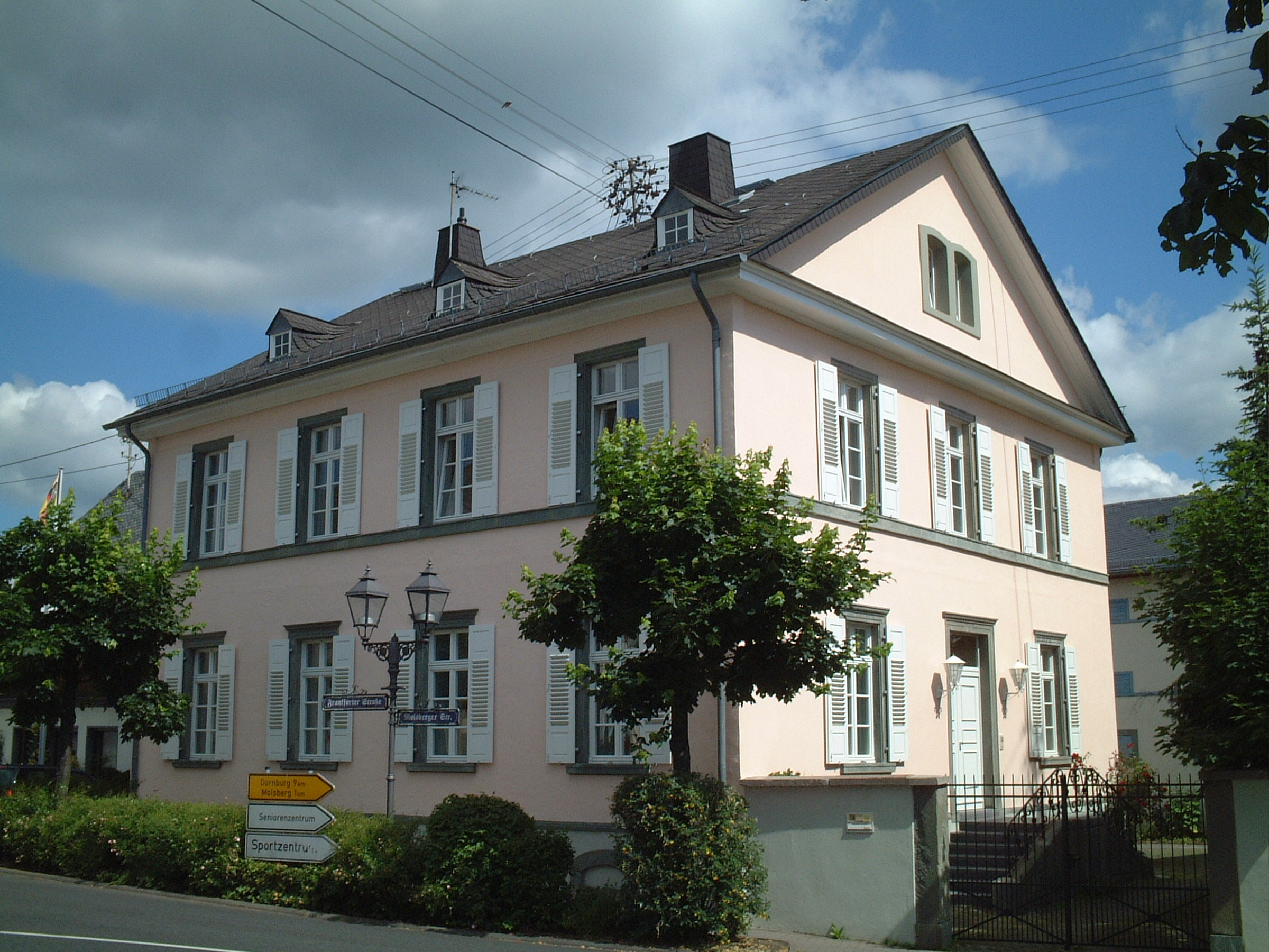 Herzoglich nassauische Receptur von 1834 in spät-klassizistischem Stil, später Forstamt bis 2004, heute Privathaus